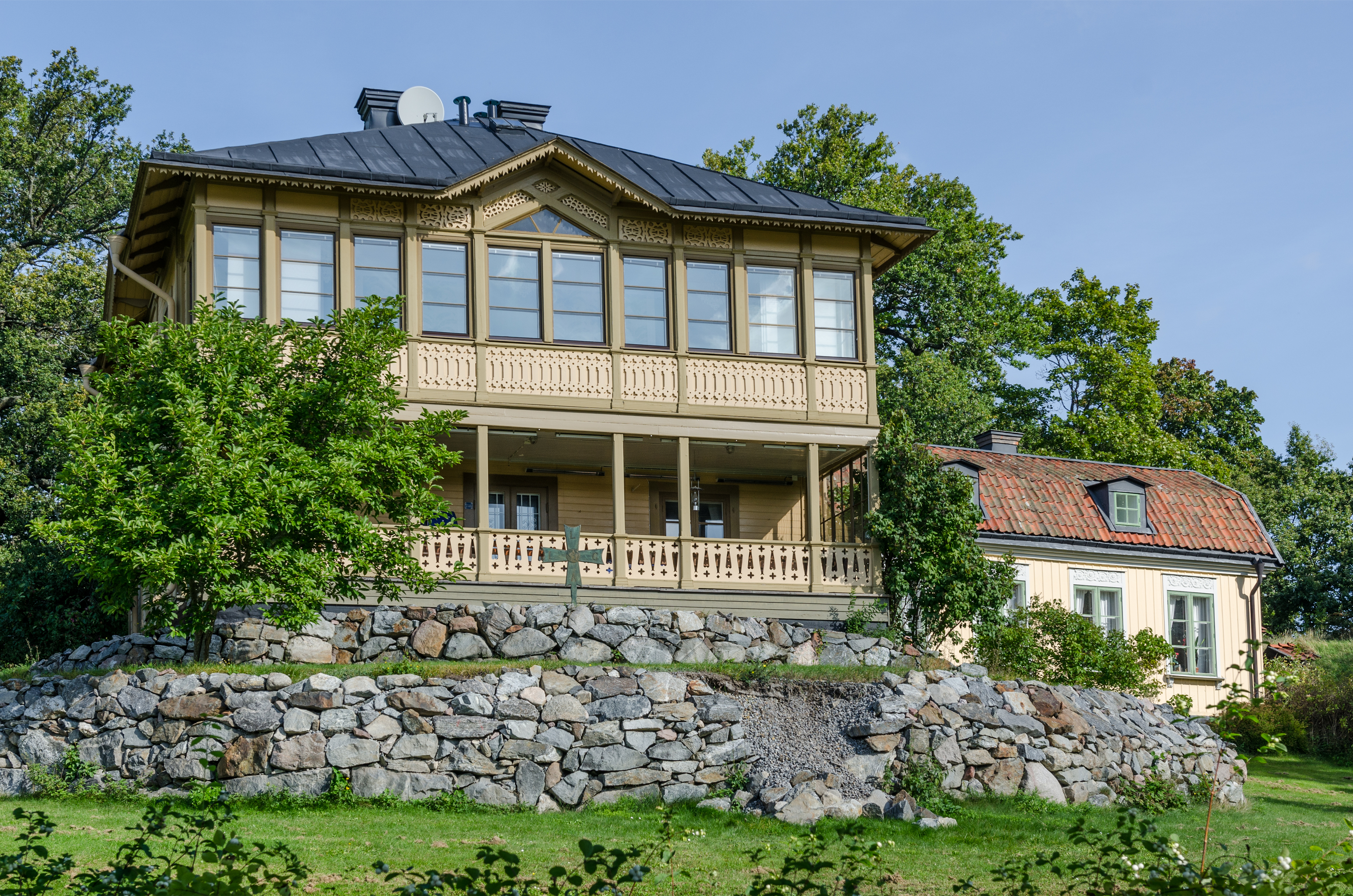 Johannisberg, built in the 1830s. Södra Djurgården, Stockholm.